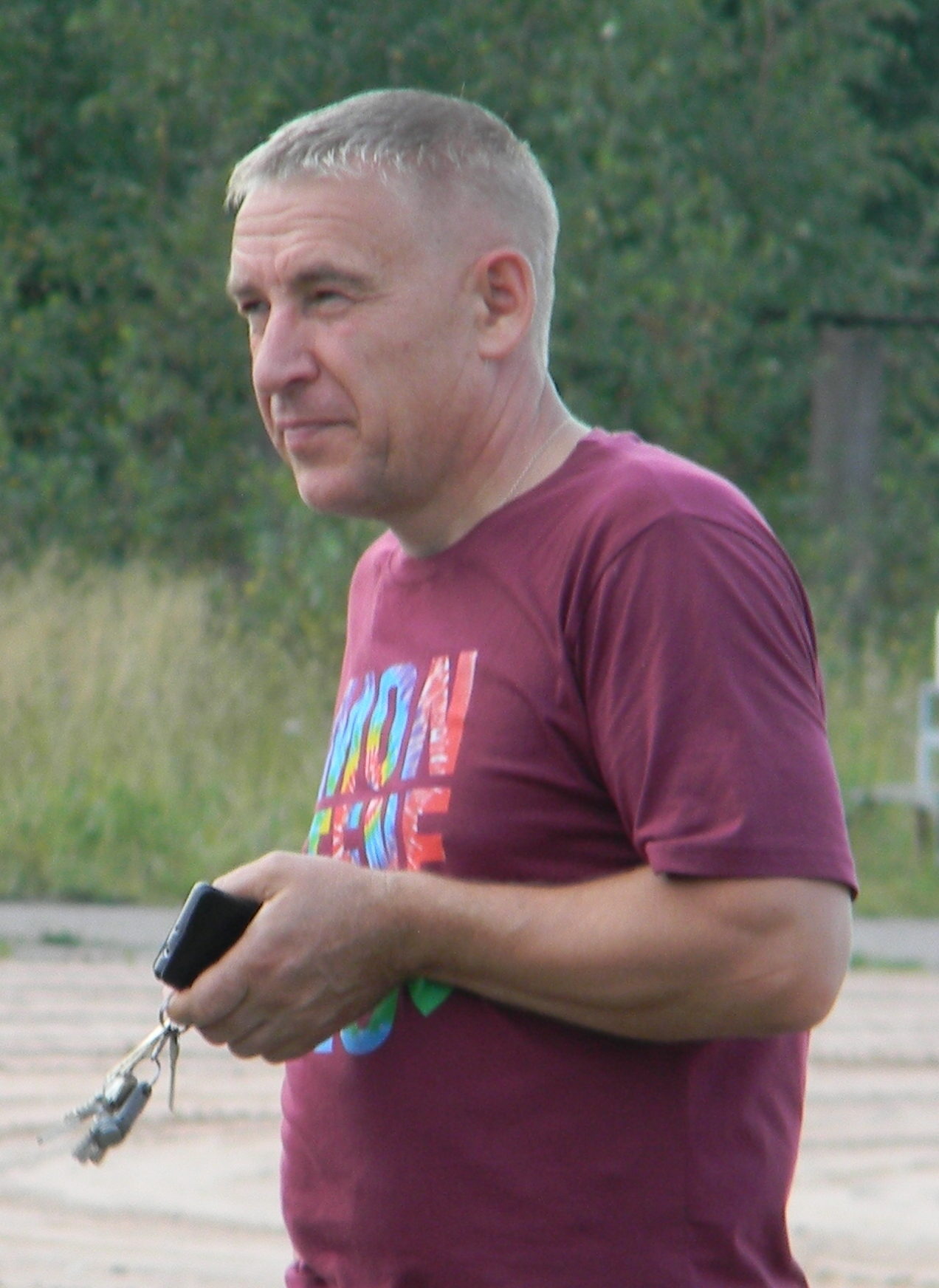 Леонид Хоменко, исполнительный директор ФК Тосно, 2015